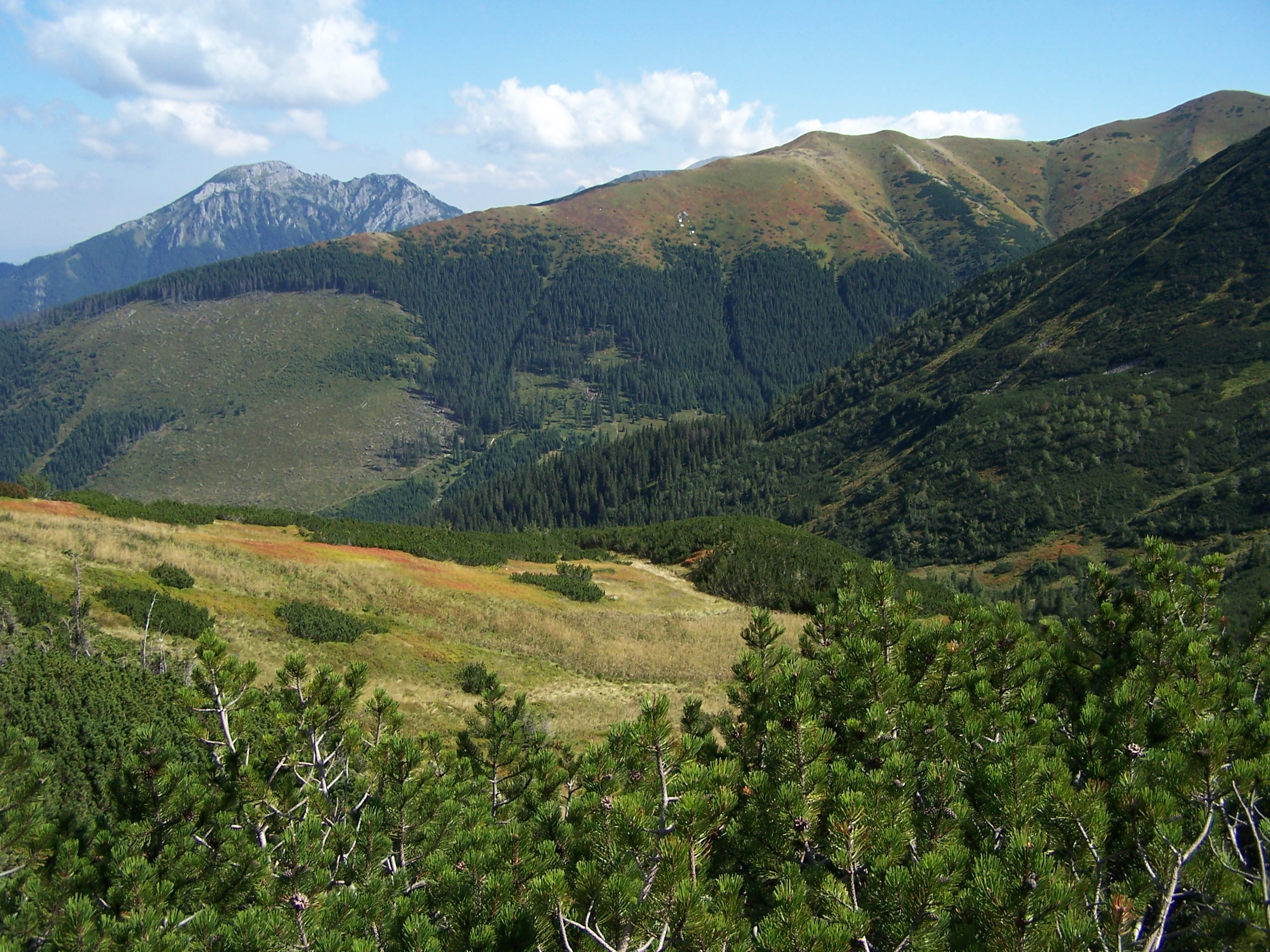 Wyżnia Polana Chochołowska. W głębi Kominiarski Wierch